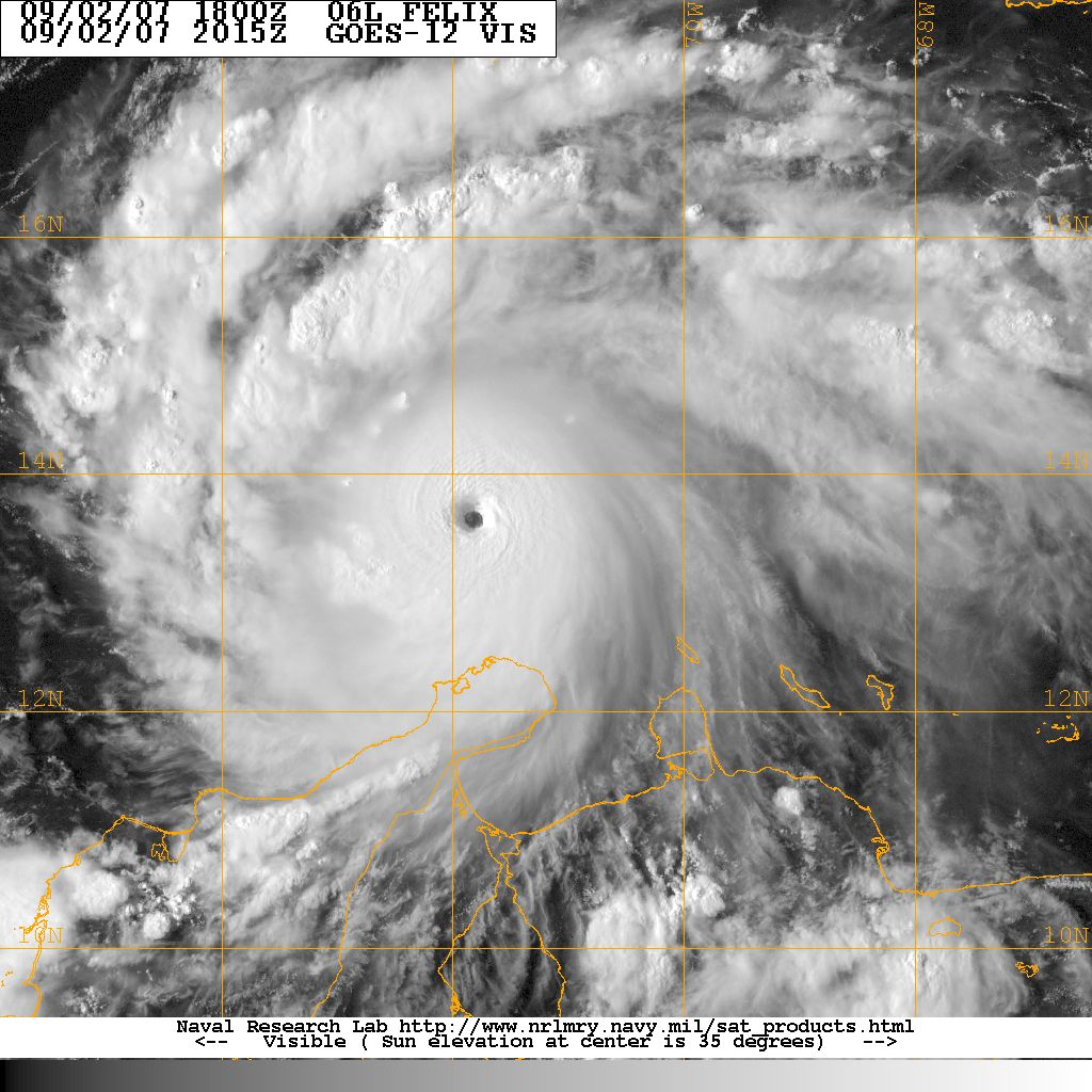 Felix op 2 september om 20h15 UTC met windsnelheden tot 222 km/uur, 956 hPA.